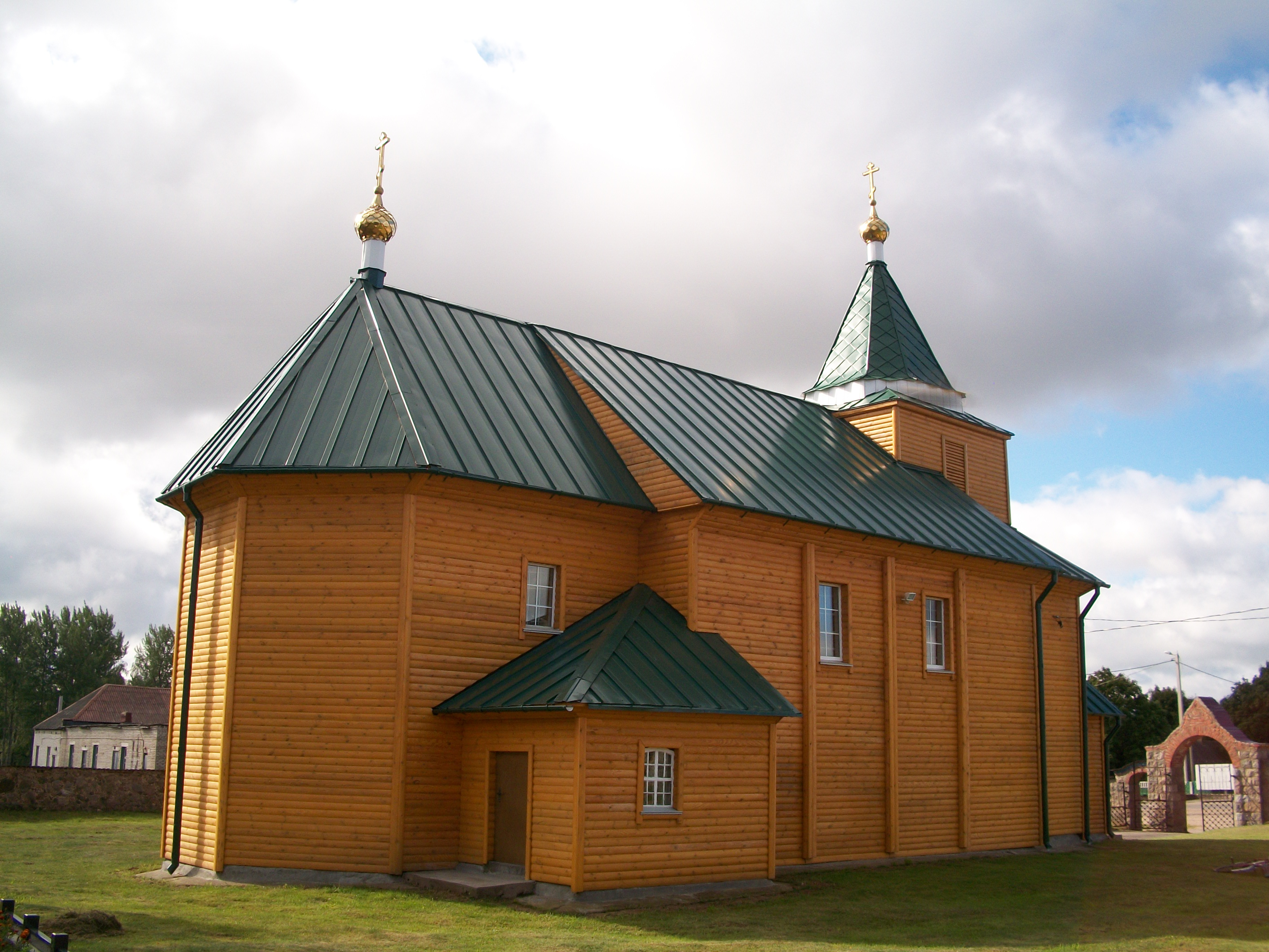 Беларуская (тарашкевіца): Сьвята-Траецкая царква. в. Княгінін This is a photo of Belarusian heritage monument. Reference number: 613Г000434 ( WLM)